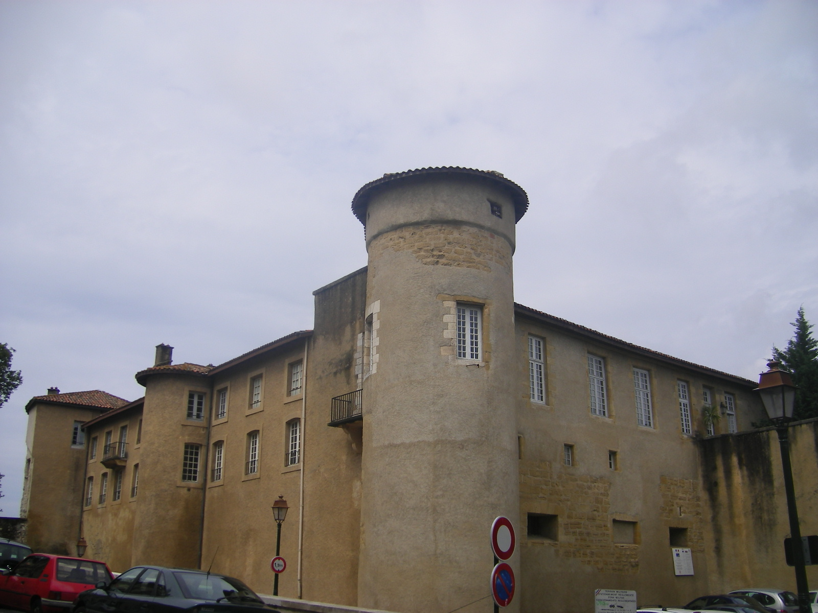 Le Château vieux